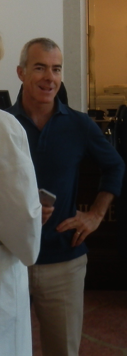 Giampaolo Letta all'interno dell'Hotel Excelsior durante il Festival di Venezia 2015